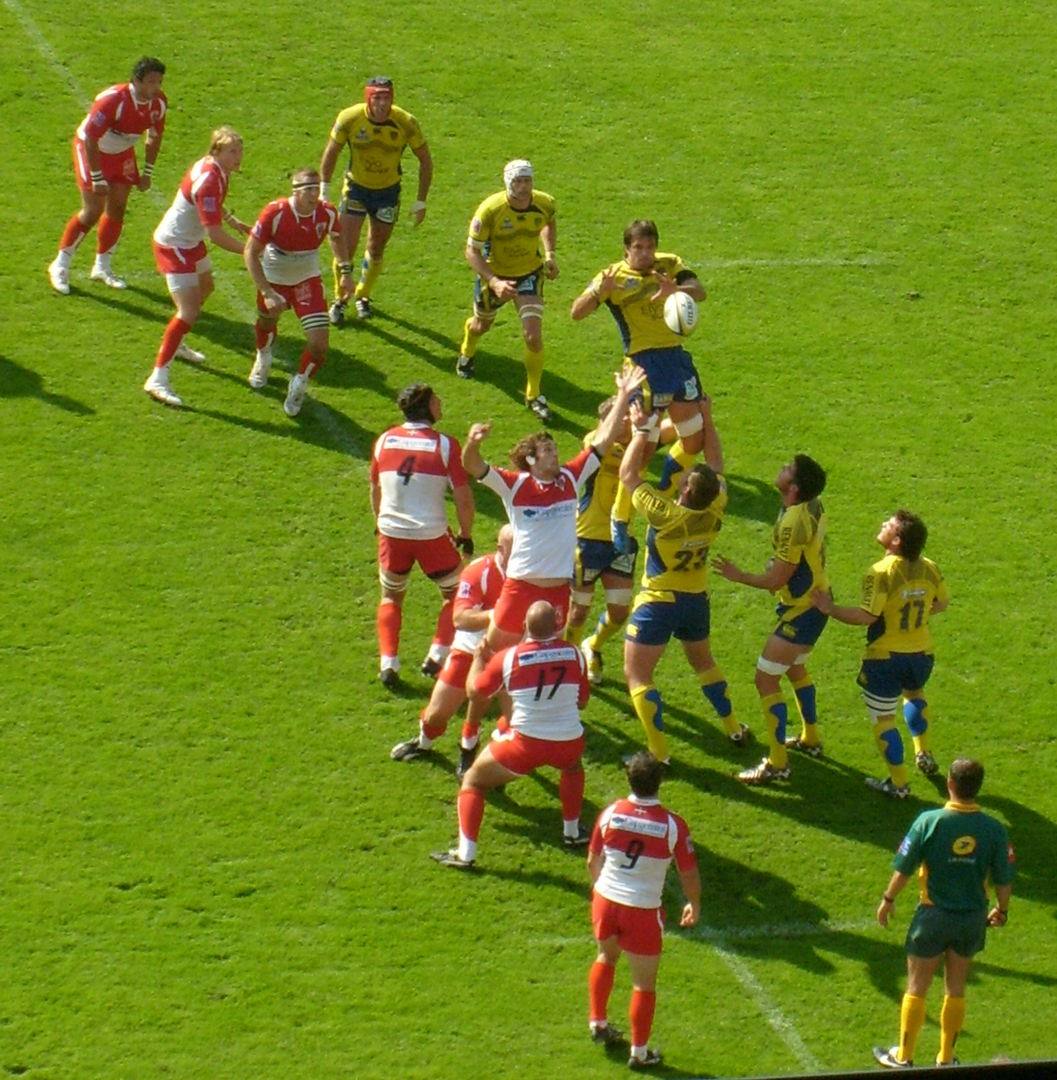 Une touche lors du match opposant l'ASM Clermont Auvergne au Biarritz Olympique au stade Marcel Michelin de Clermont-Ferrand.